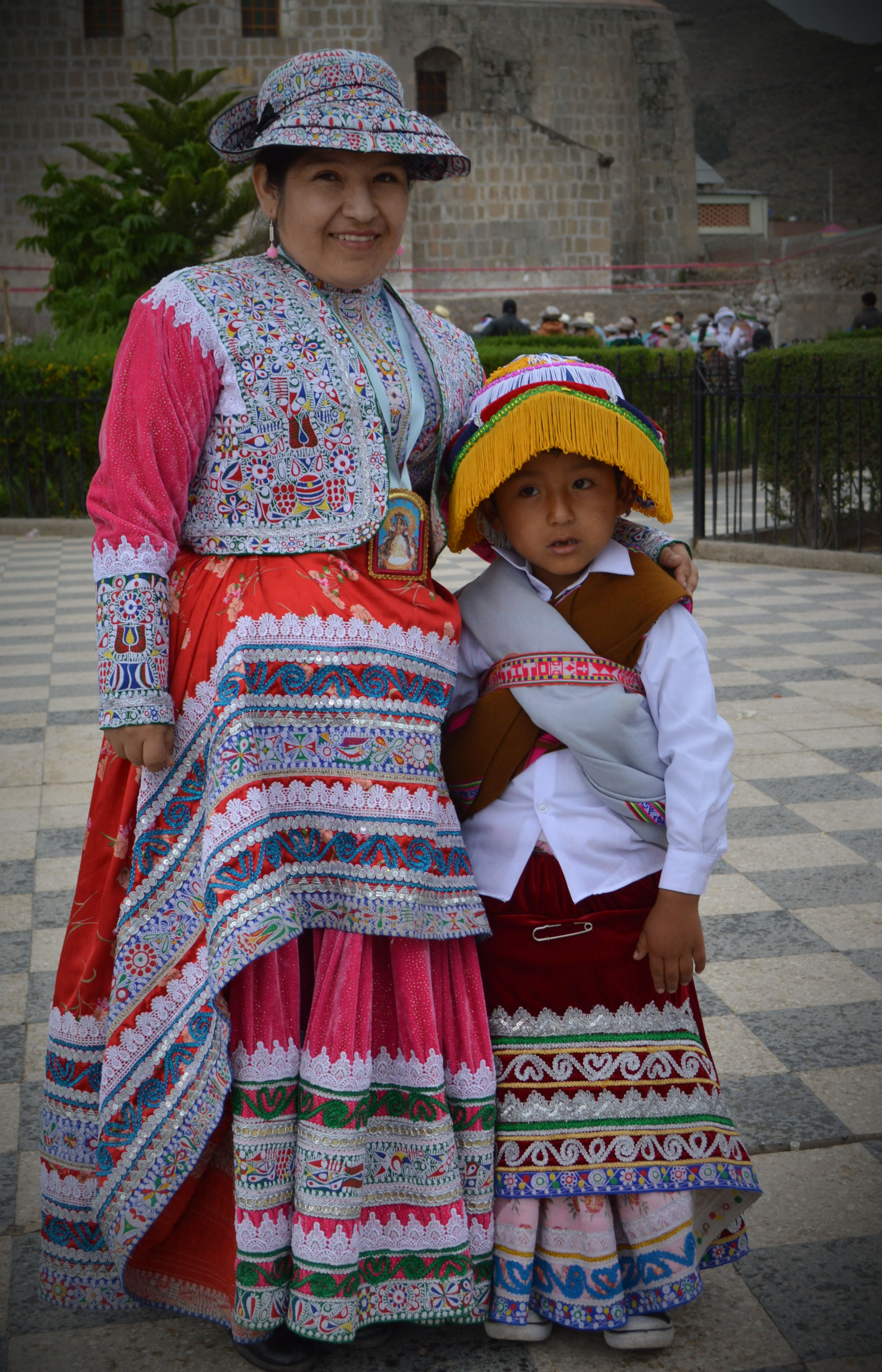 Madre e hijo en la danza del amor del Witiwiti en el Cañón del Colca ,en Perú.